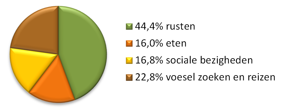 dagindeling zijdesifaka